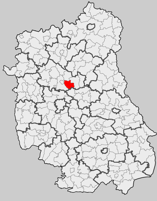 Map of gmina Serniki, Lubartów county, Lublin voivodship Mapa gminy Serniki, powiat lubartowski, województwo lubelskie